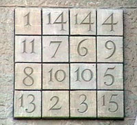 Pictograma del templo espiatorio de la Sagrada Familia, España.